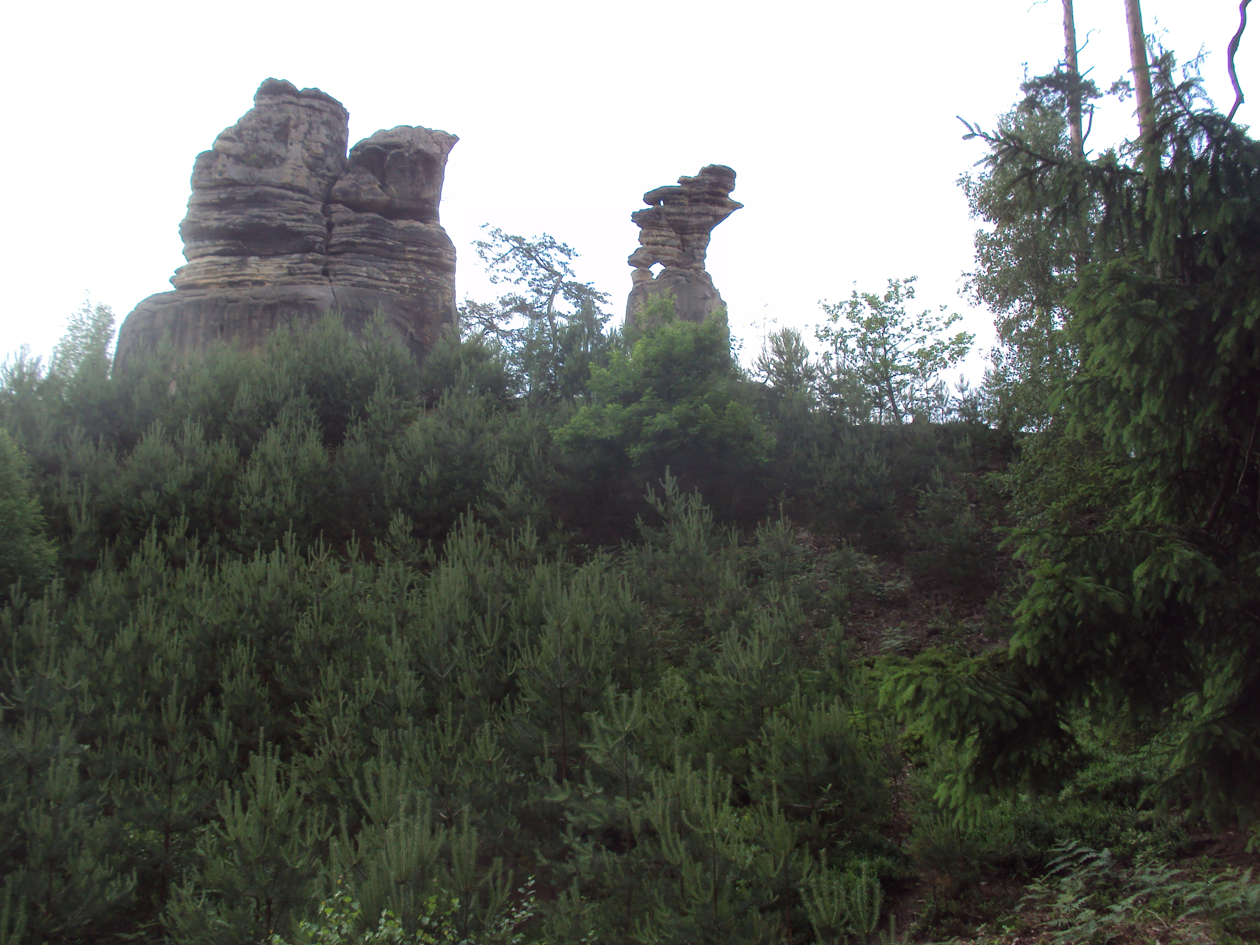 Skalnaté věže v Údolí samoty